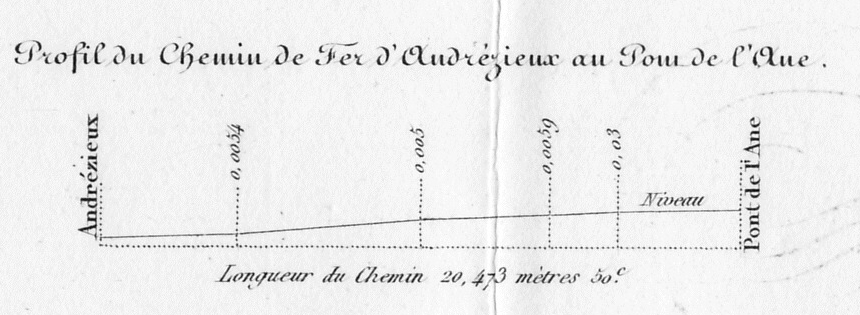 Profil en long du chemin de fer de Saint-Étienne à Andrezieux.